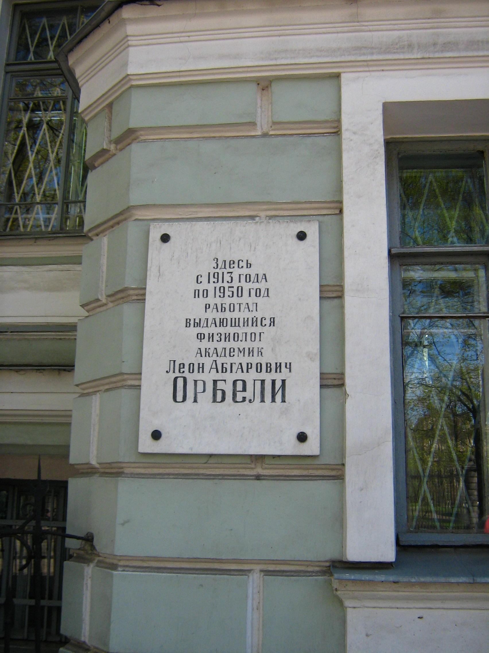 Leon Orbeli's Commemorative plaque : Komissara Smirnova Street, 10